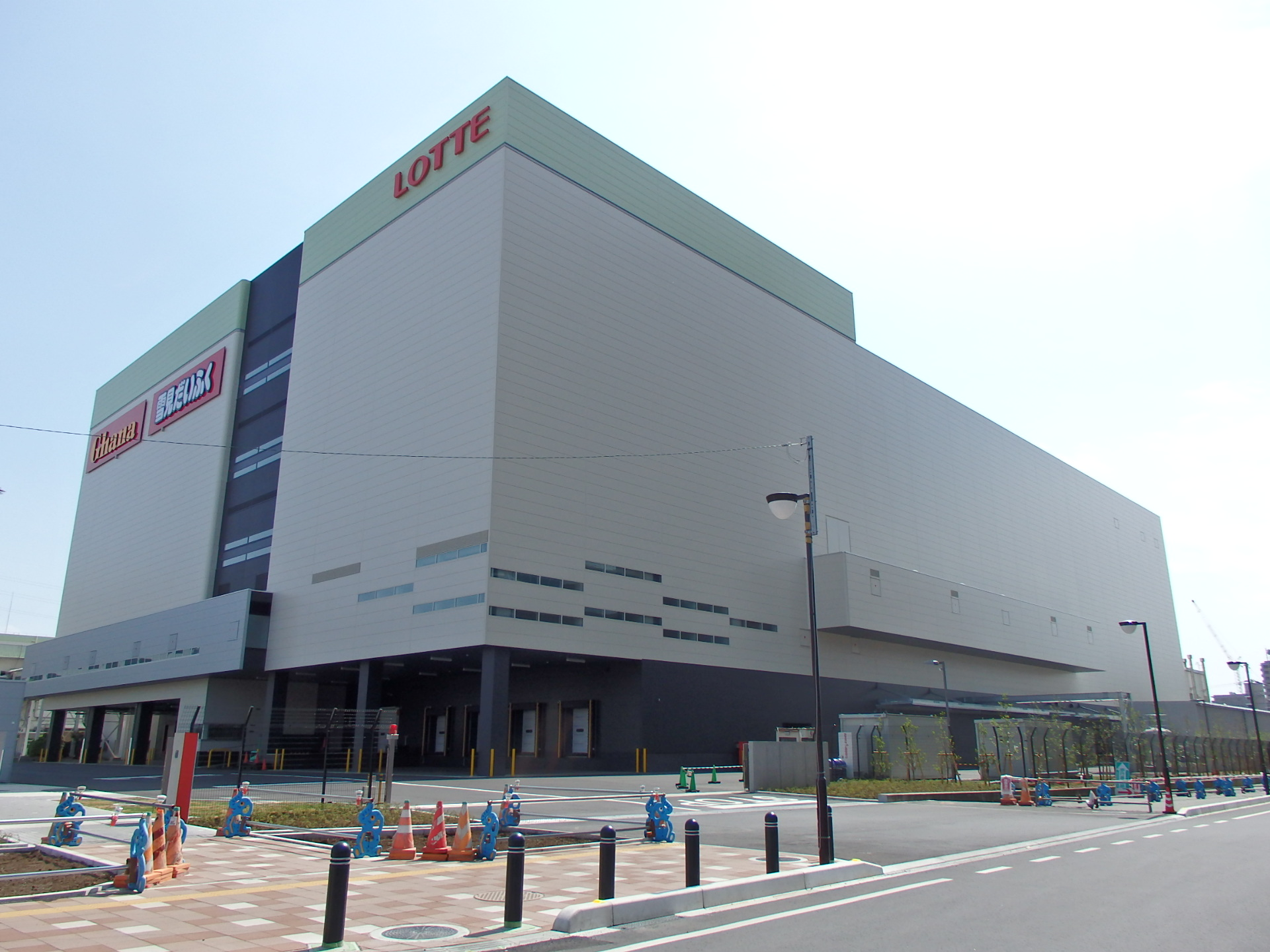 ロッテ浦和工場（さいたま市南区）